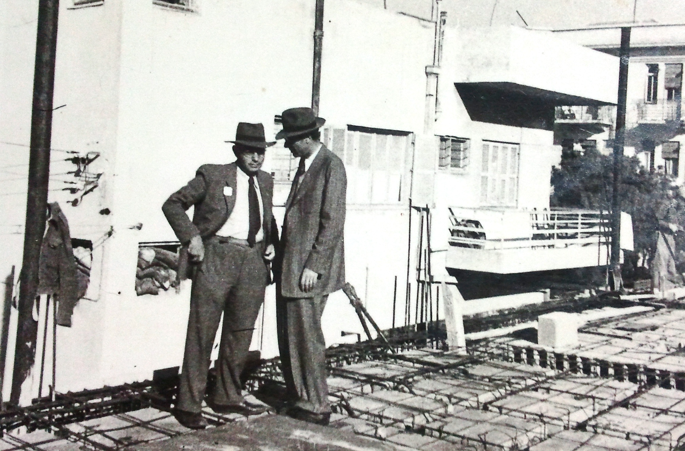 אשר גליברמן